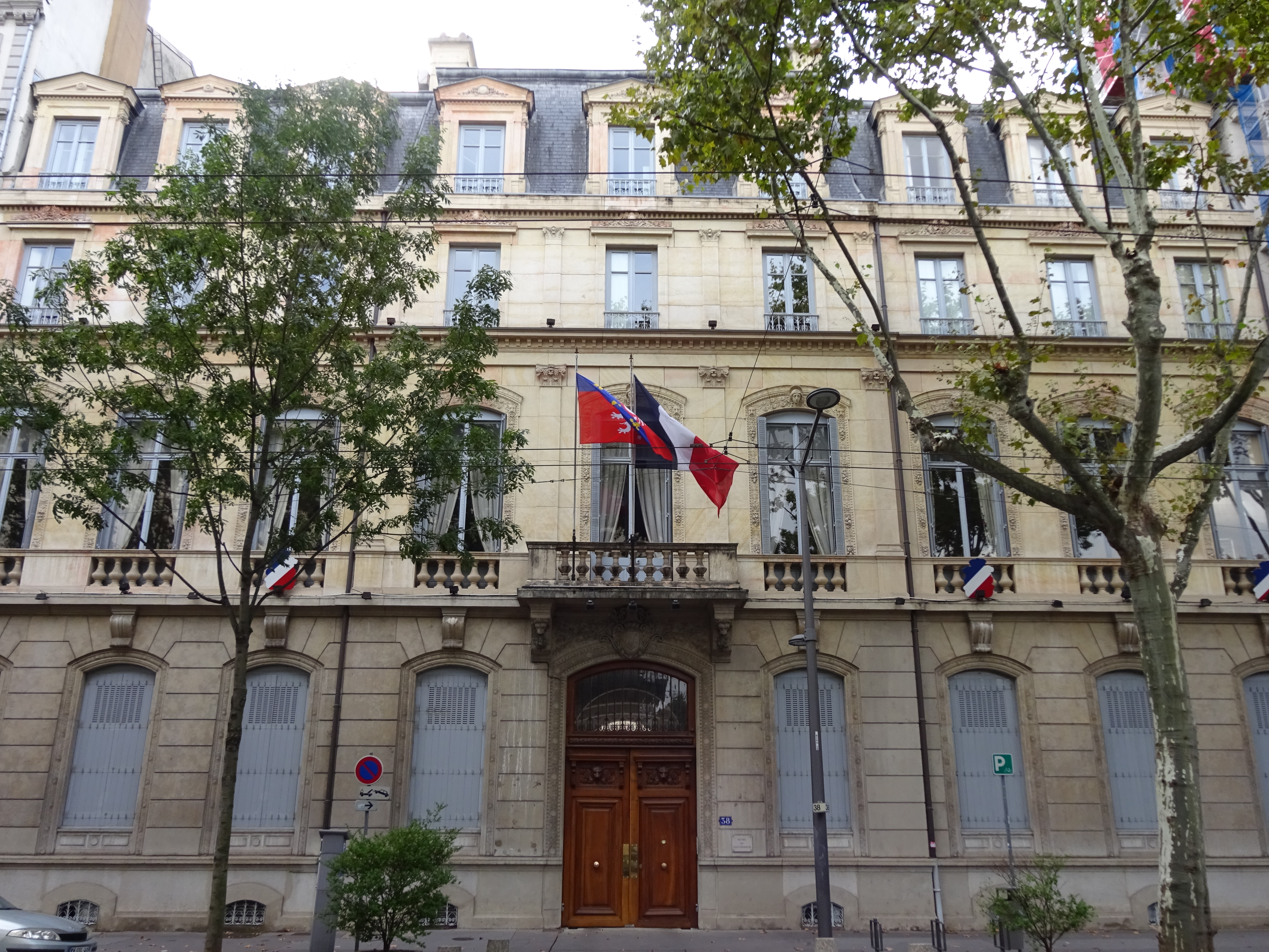 Vue de face de l'Hôtel du Gouverneur militaire de lyon.